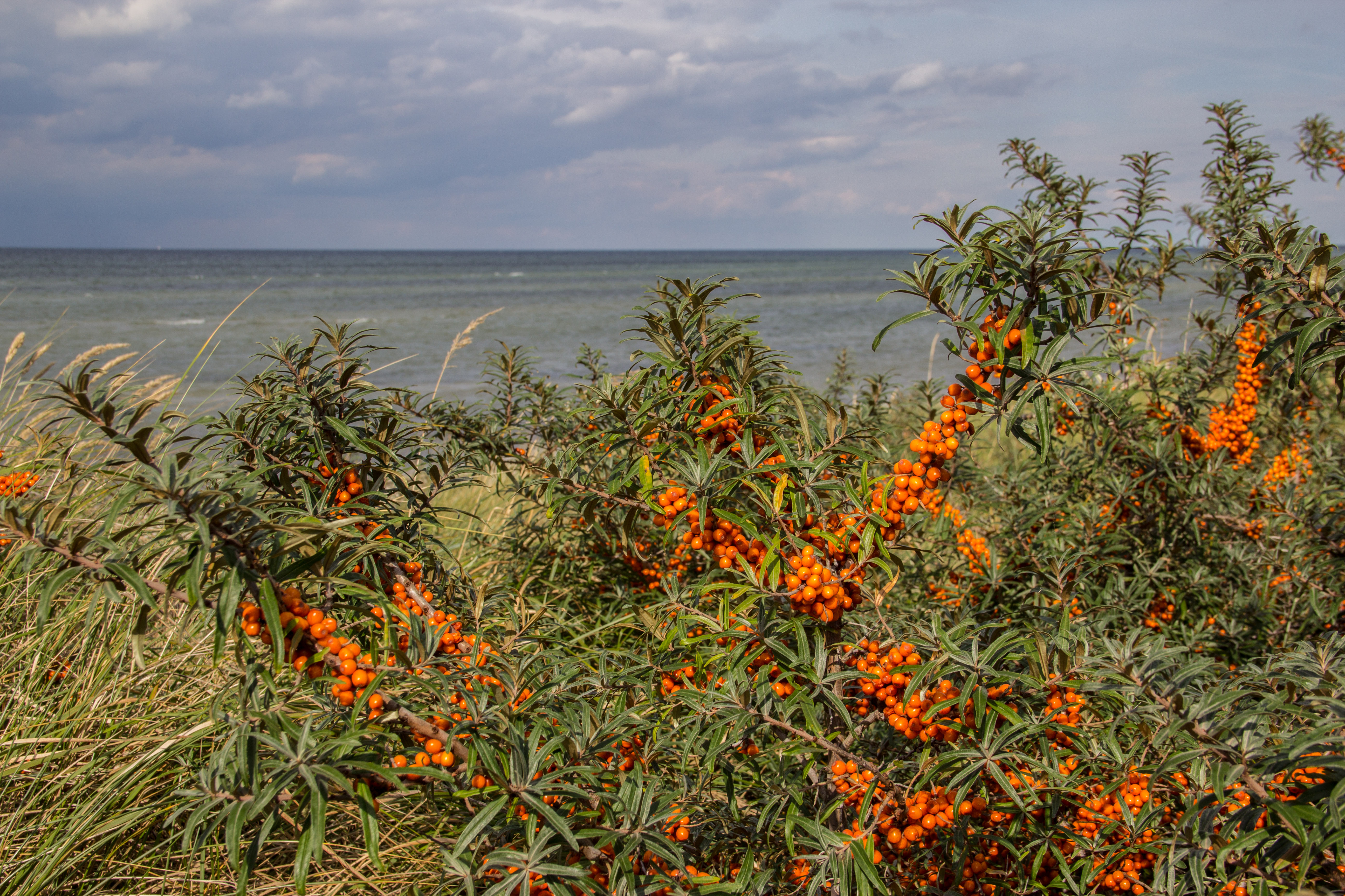 Insel Poel, Wismarbucht und Salzhaff